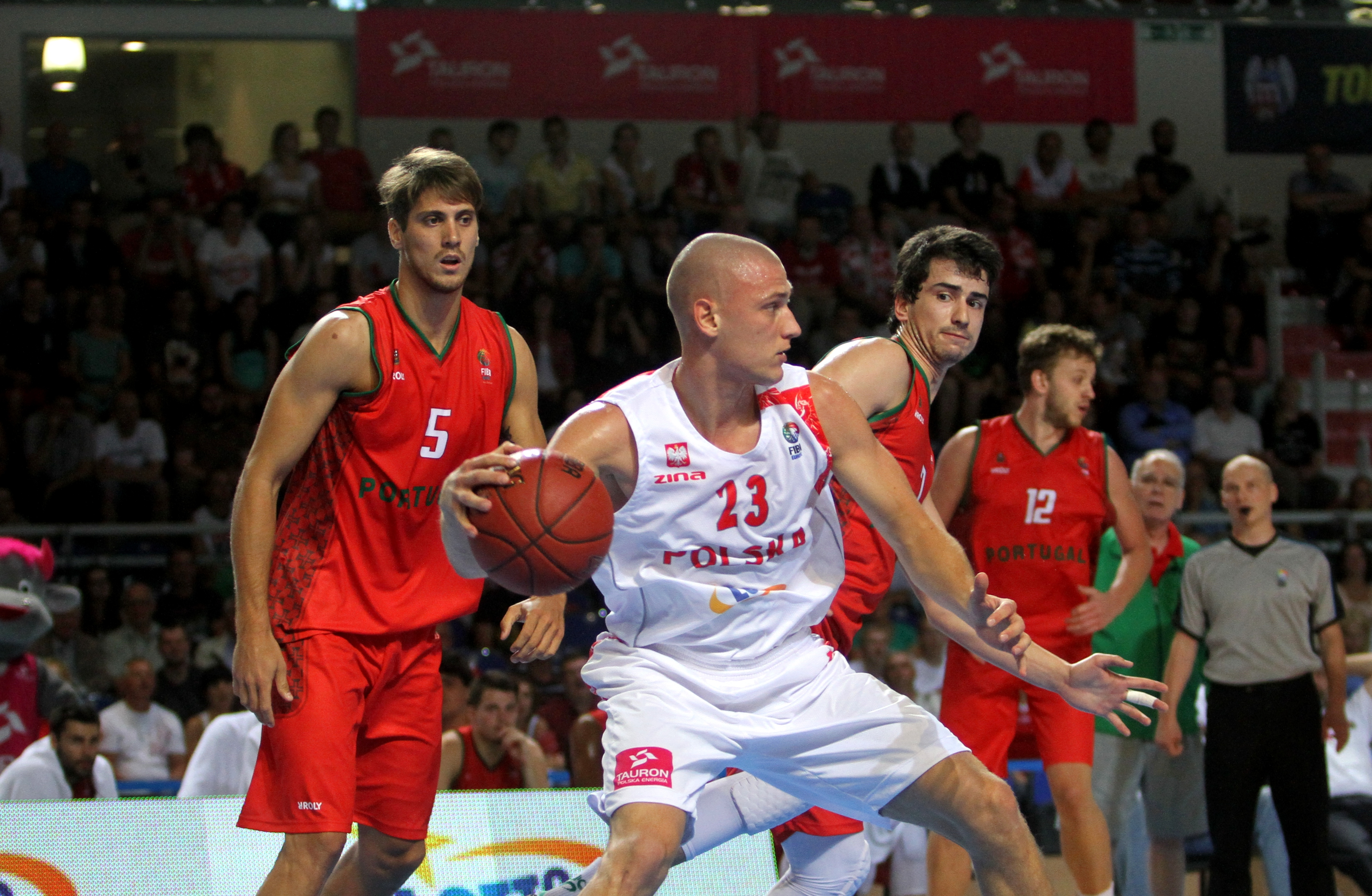 Toruń Basket Cup: Polska - Portugalia, 1 sierpnia 2014. Michał Michalak